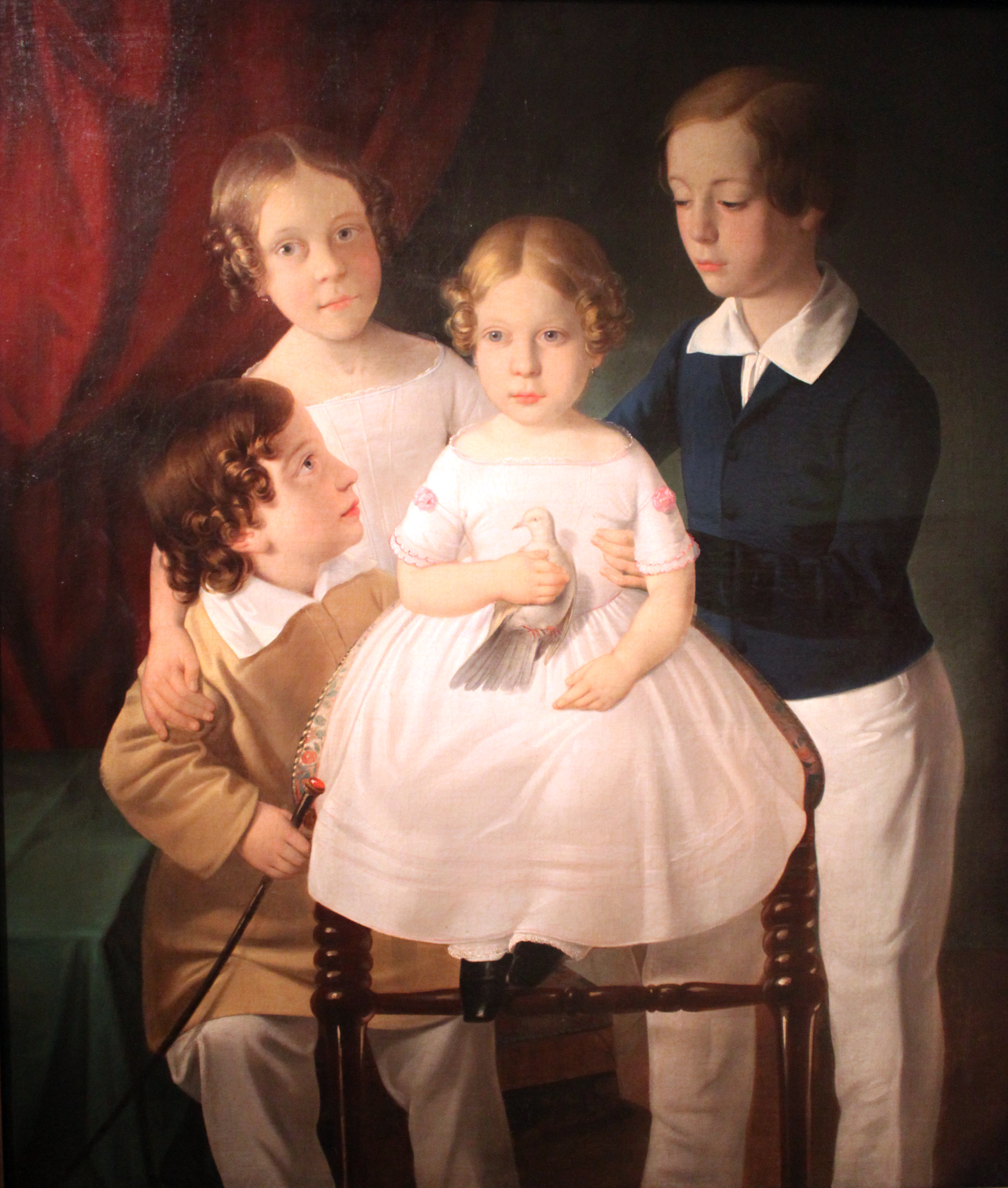 The four children of cabinet manufacturer Franz Zlamallabel QS:Lde,"Die vier KInder des Tischlerfabrikanten Franz Zlamal in Wien"label QS:Len,"The four children of cabinet manufacturer Franz Zlamal"